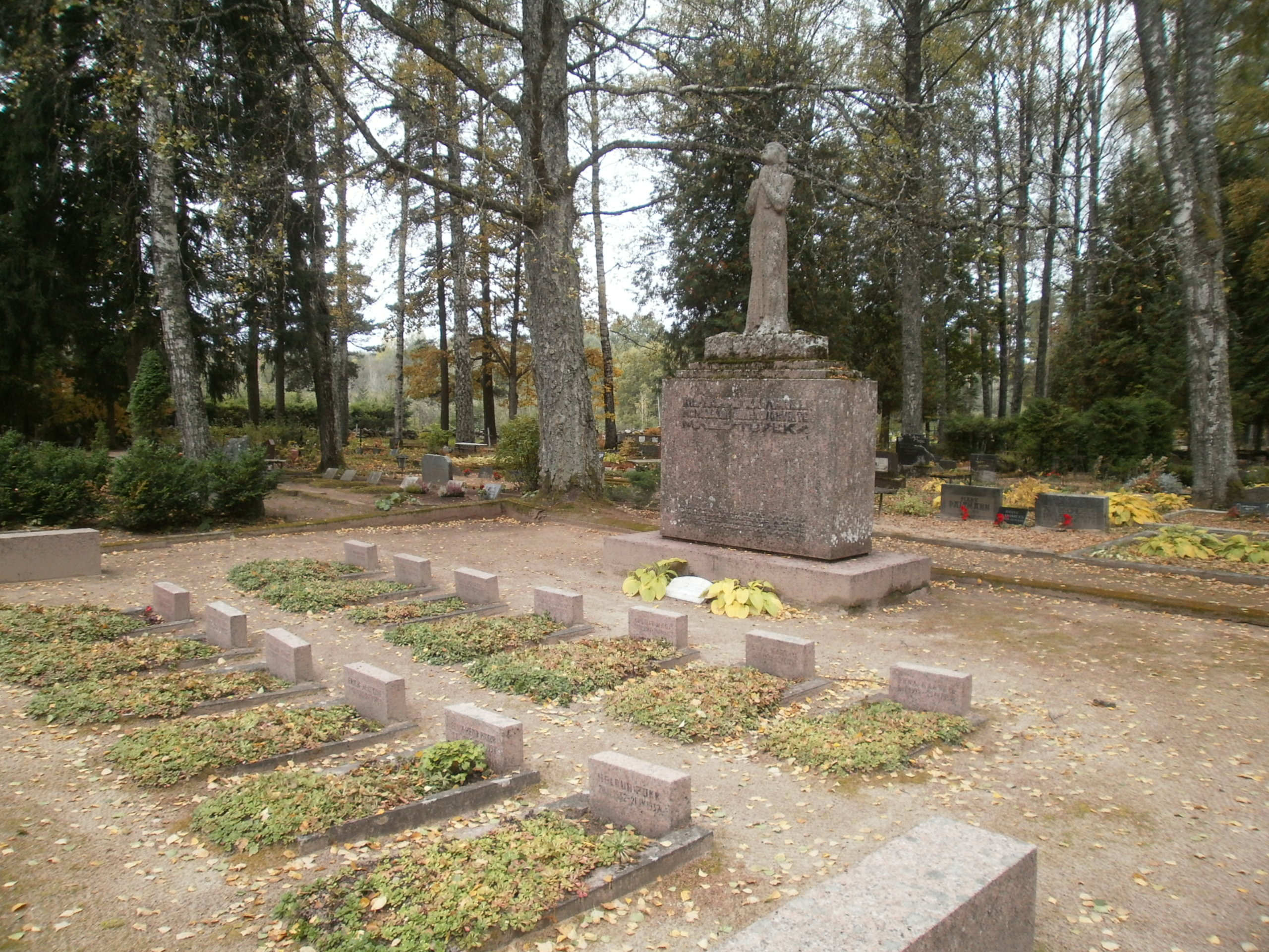 1937 a. tulekahjus hukkunud laste mälestusmemoriaal.